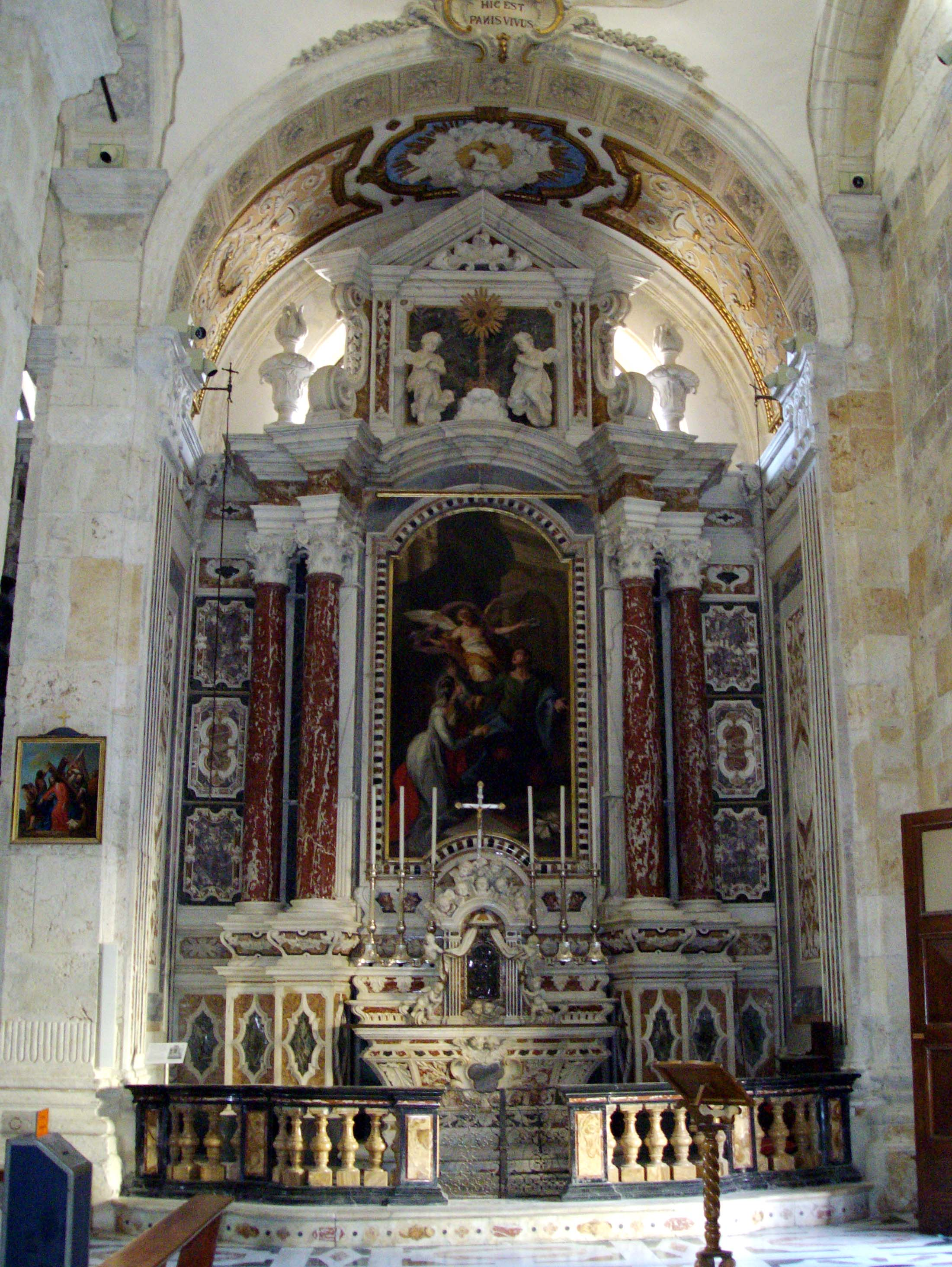 Cappella di Santa Cecilia (XVIII secolo) - Cattedrale di Cagliari